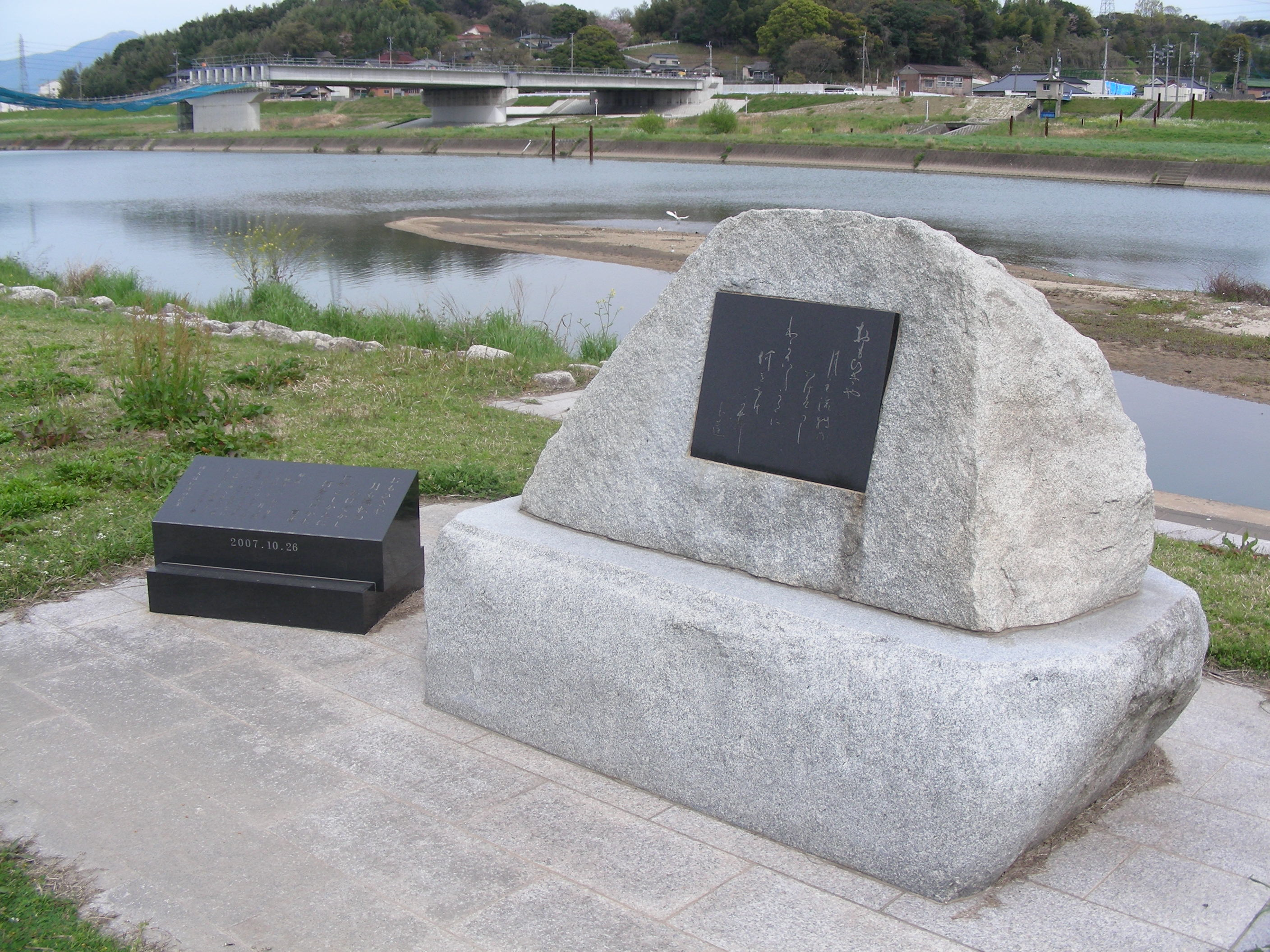 福岡県飯塚市幸袋、遠賀川・船着場にある柳原白蓮の歌碑。すぐ近くに旧伊藤伝右衛門邸がある。 「思いきや月の流転のかげぞかしわがこし方に何をなげかん」 伊藤家出奔後、宮崎龍介と再婚し、二人の子をもうけたのち、昭和10年に創刊した歌誌「ことたま」で詠んだ歌。